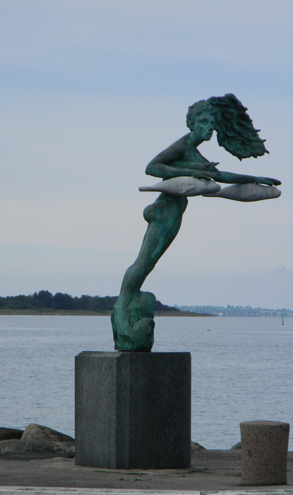 Skulptur "Elle" von Poul R. Weile im Bogenser Hafen, Dänemark, 1997, Kunst im öffentlichen Raum